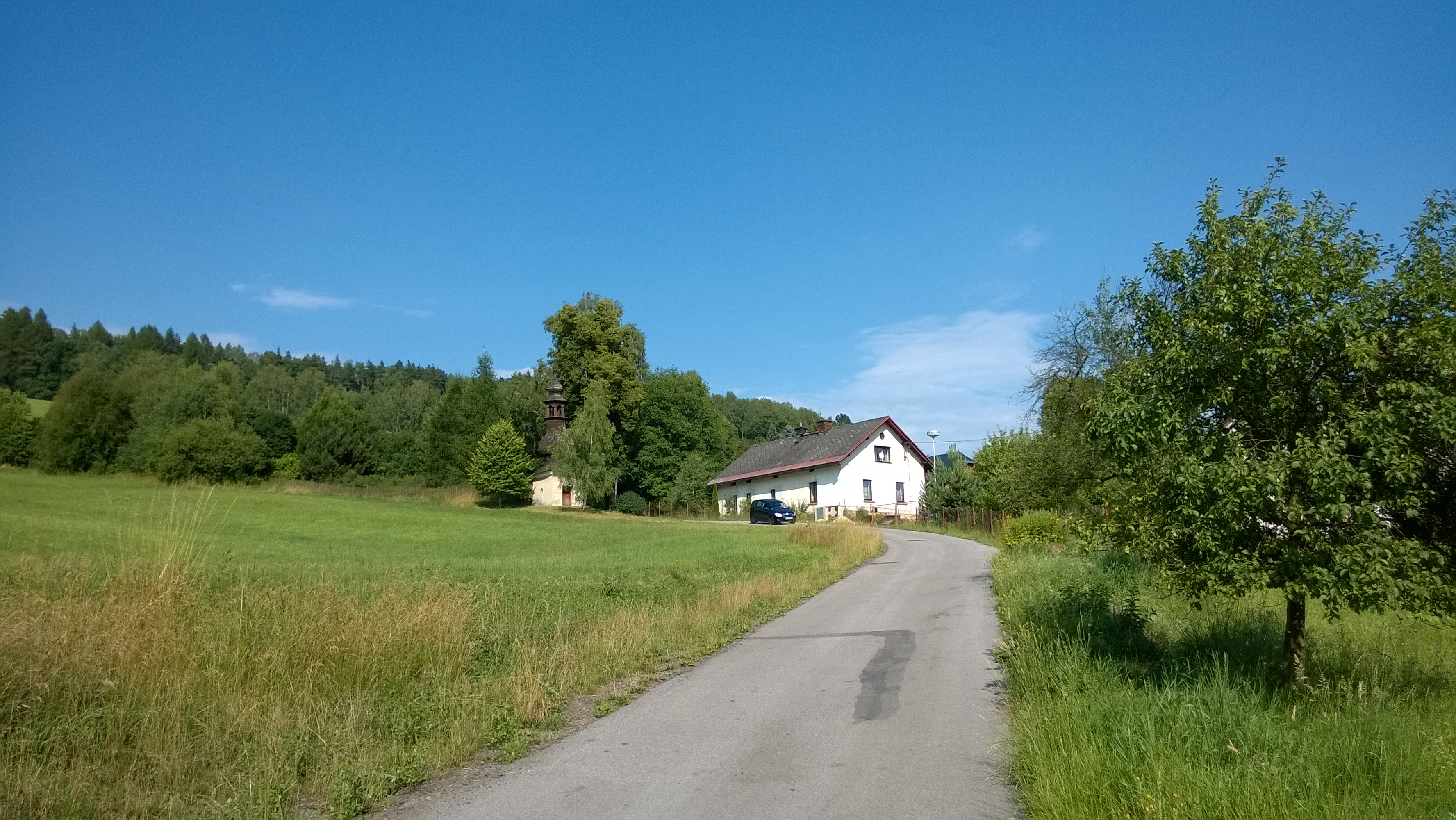 Pohled na cestu k zvonici